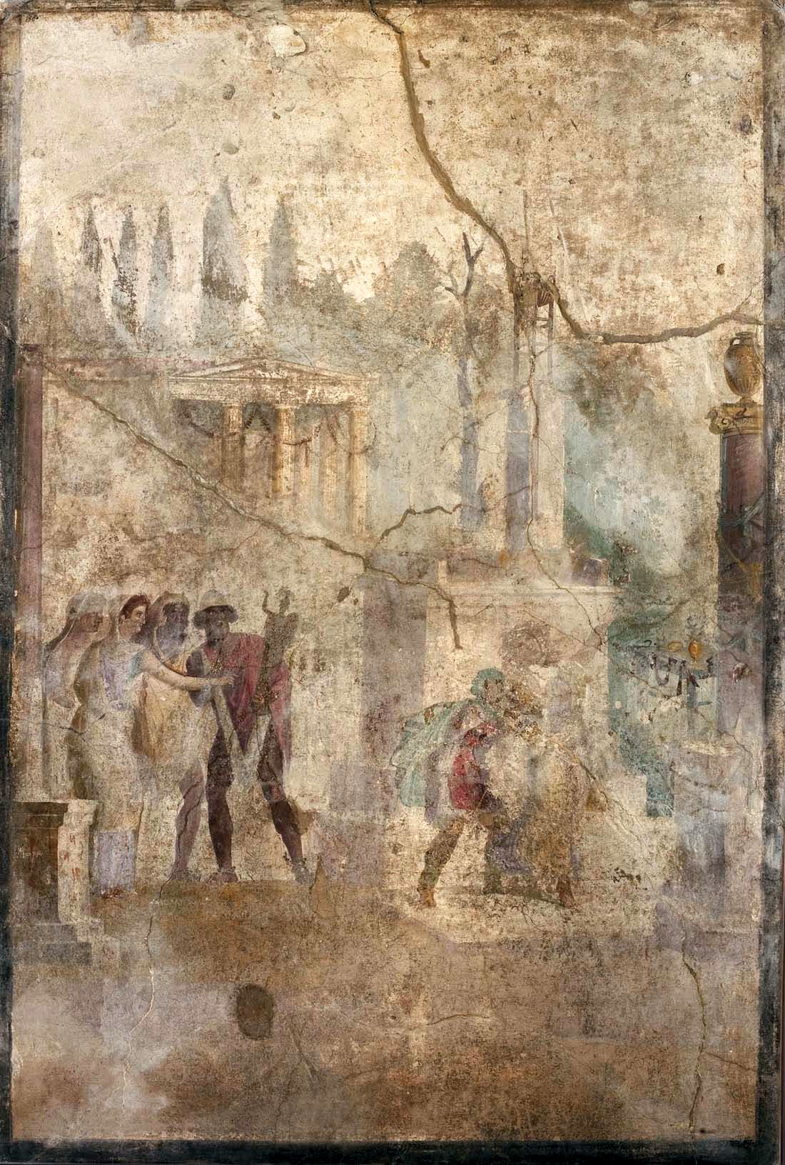 Affresco con l’episodio del ratto del Palladio, da Pompei, casa degli Attori